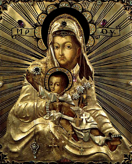 Russian Marian Icon “Gracious” (Milostivaya). Икона Милостивая (Киккская). Зачатьевский монастырь (Москва).